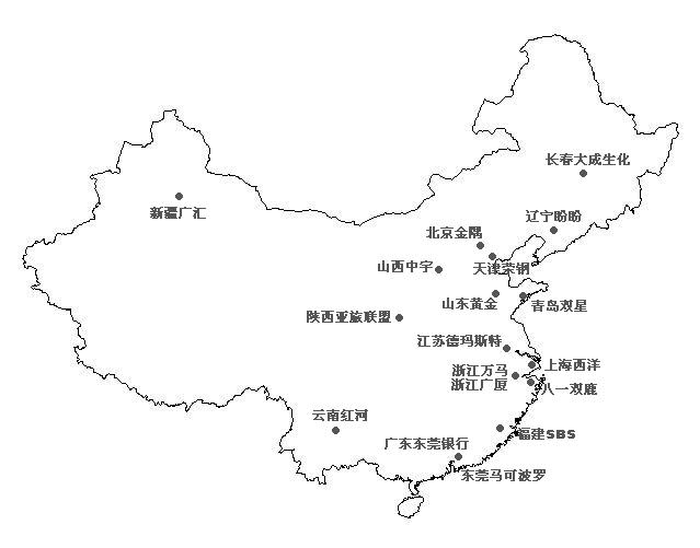 中文（中国大陆）: 2008-09赛季CBA各队所在地